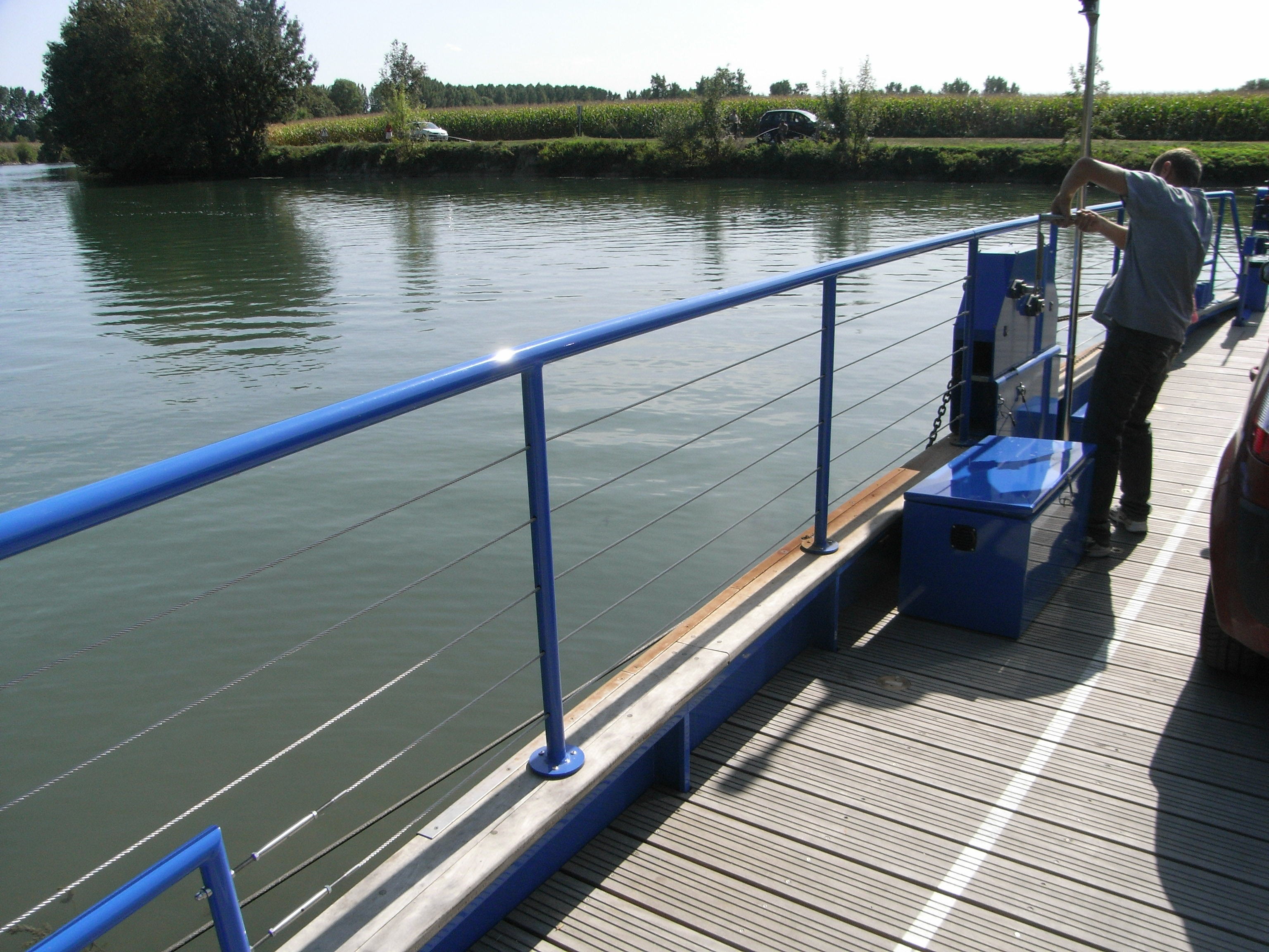 Le "Châ p'tit va loin", dernier bac à chaine français à manoeuvres manuelles sur la Charente entre Dompierre-sur-Charente et Rouffiac (Charente-Maritime).